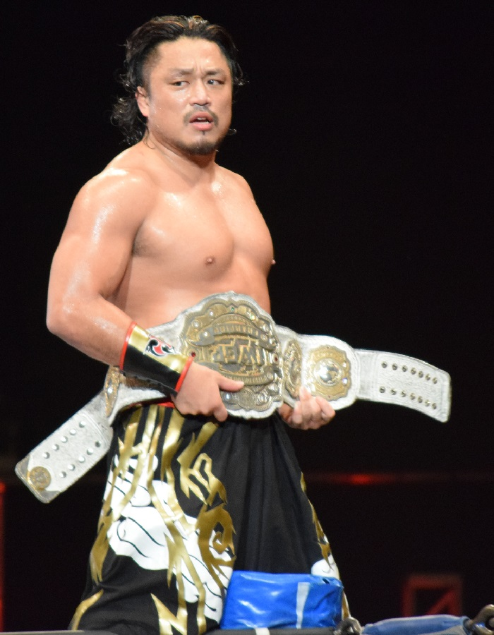 2015年8月1日 大阪府立体育会館 「G1 CLIMAX 25」 後藤洋央紀